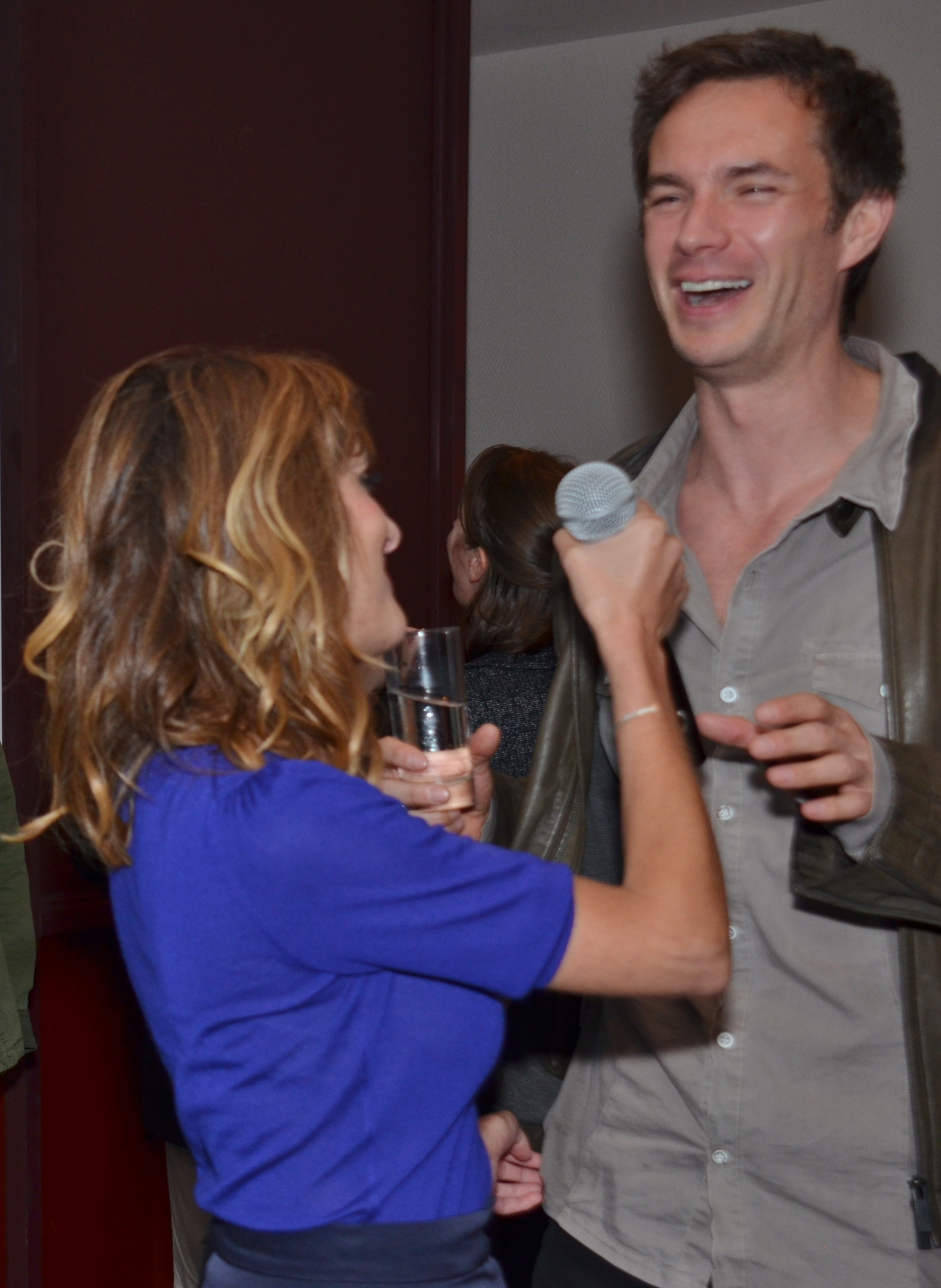 James D'Arcy au Festival du film britannique de Dinard 2016